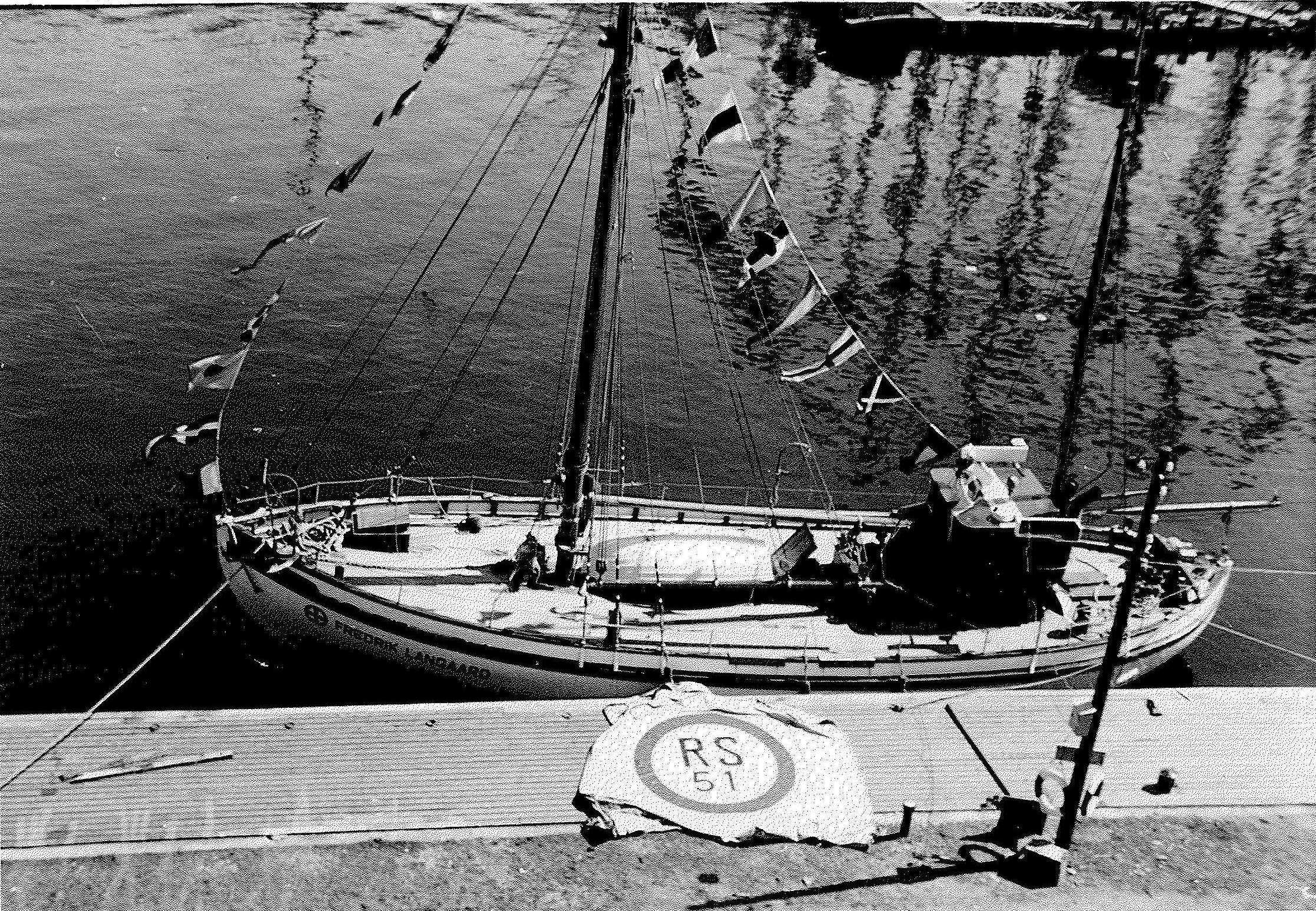 Fredrik Langgaard RS 51